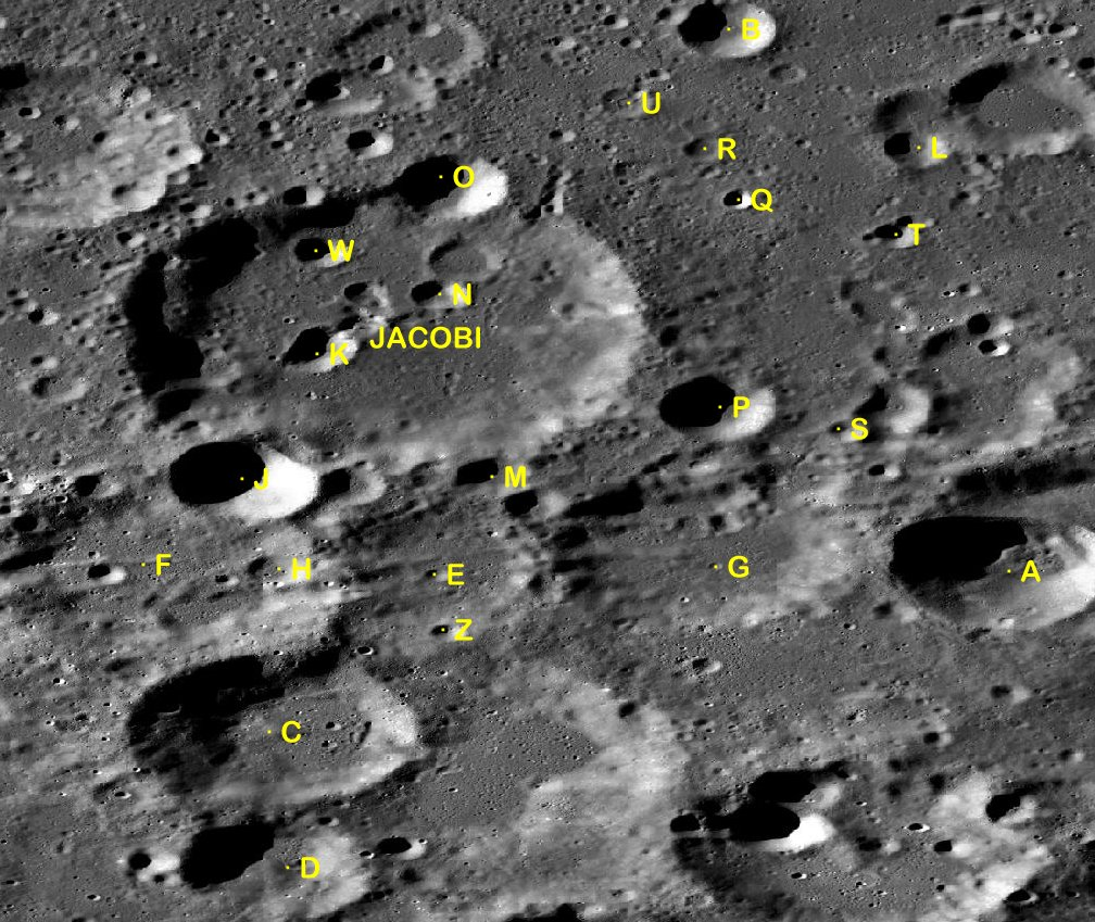 Cráter lunar Jacobi. Cráteres satélite. (Imagen LRO)